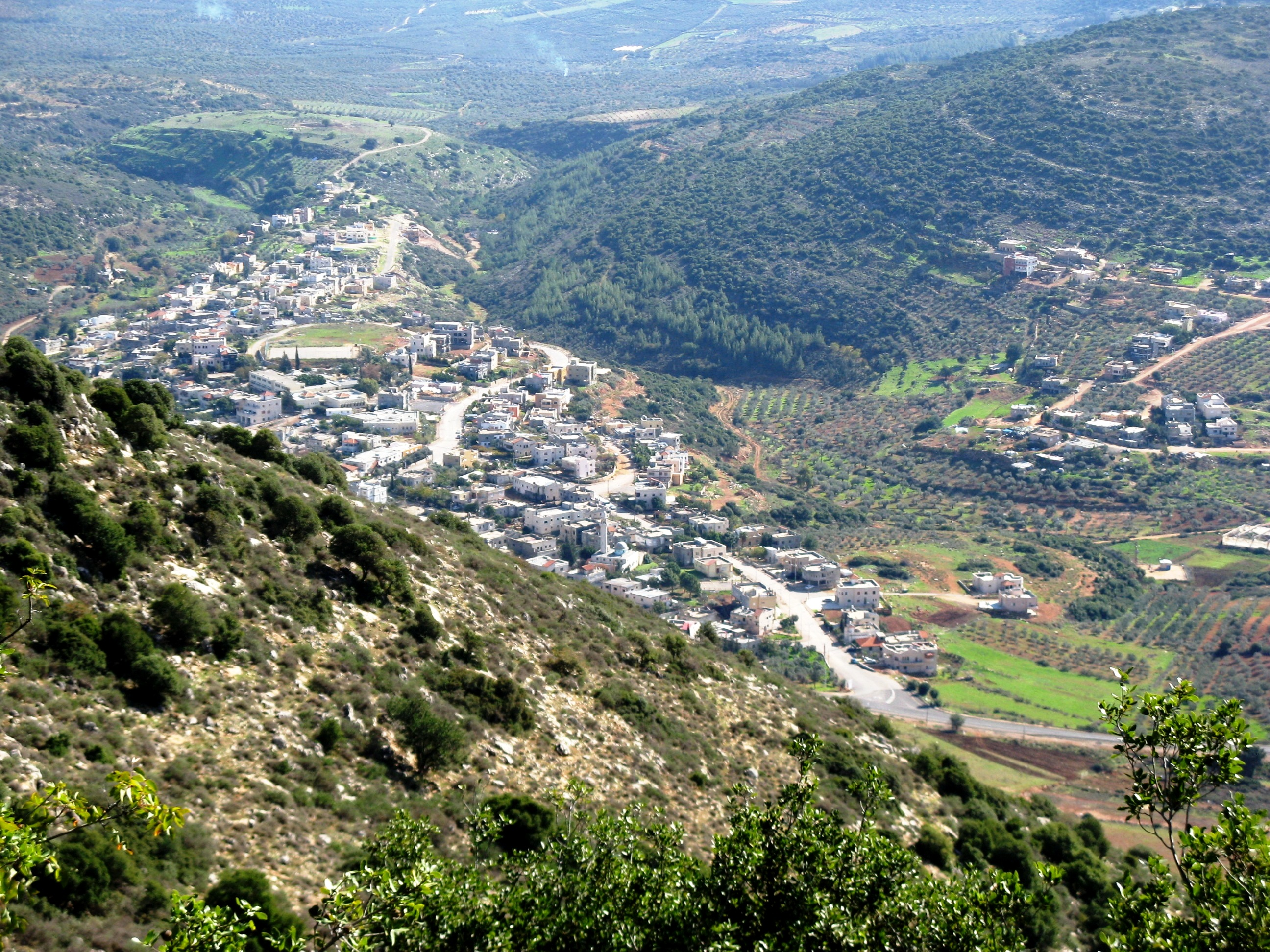 סלאמה הוא כפר בדואי בגליל המערבי בתחומי המועצה האזורית משגב. צילום מהר כמון